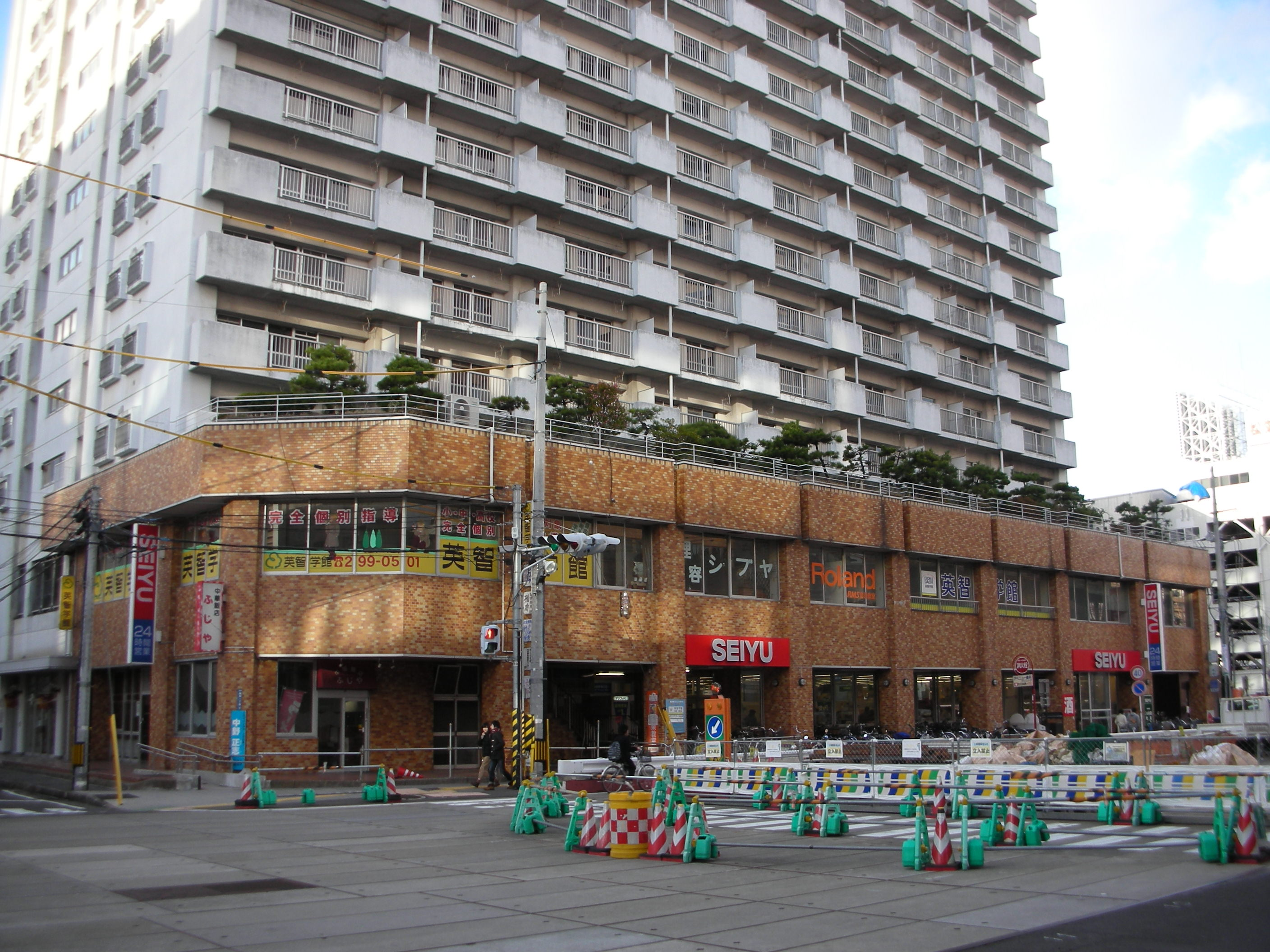 西友仙台駅東口店の外観。